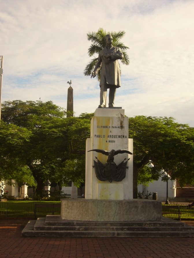 Statue of Pablo Arosemena, Plaza de Francia, Casco Antiguo, Panama City.